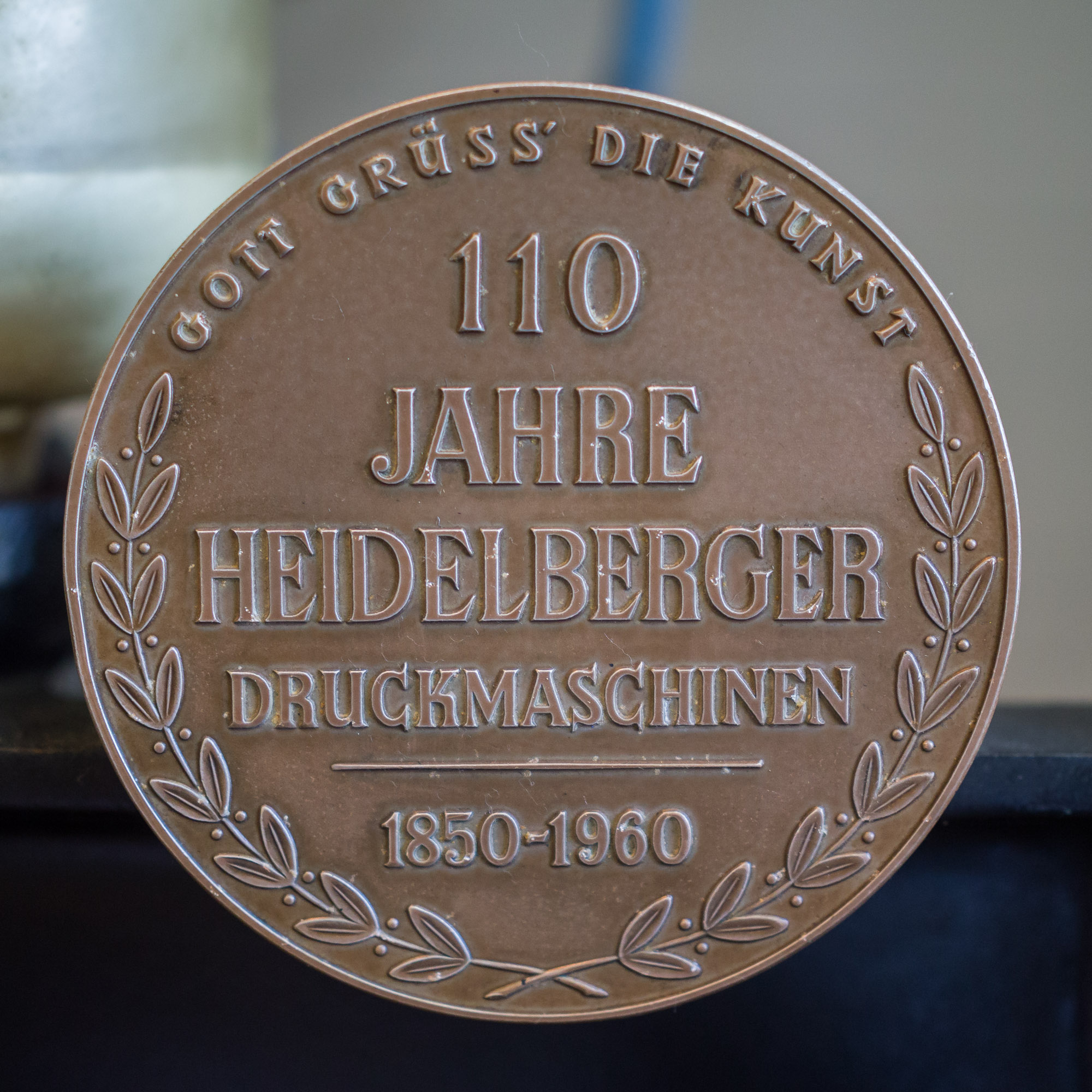 Openluchtmuseum Ellert en Bammert te Schoonoord - 110 Jahre Heidelbeger